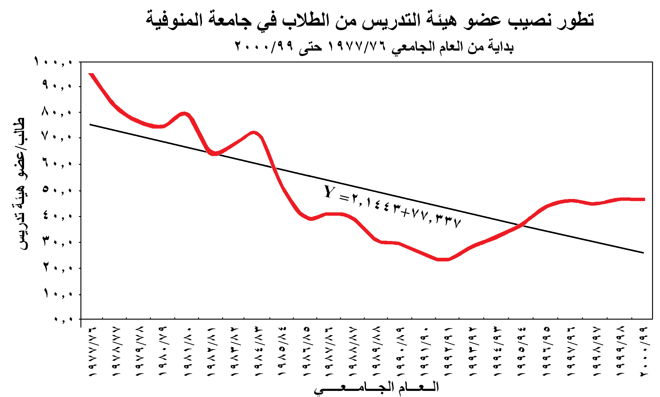 تطور نصيب عضو هيئة التدريس من الطلاب في جامعة المنوفية (1976-2000(